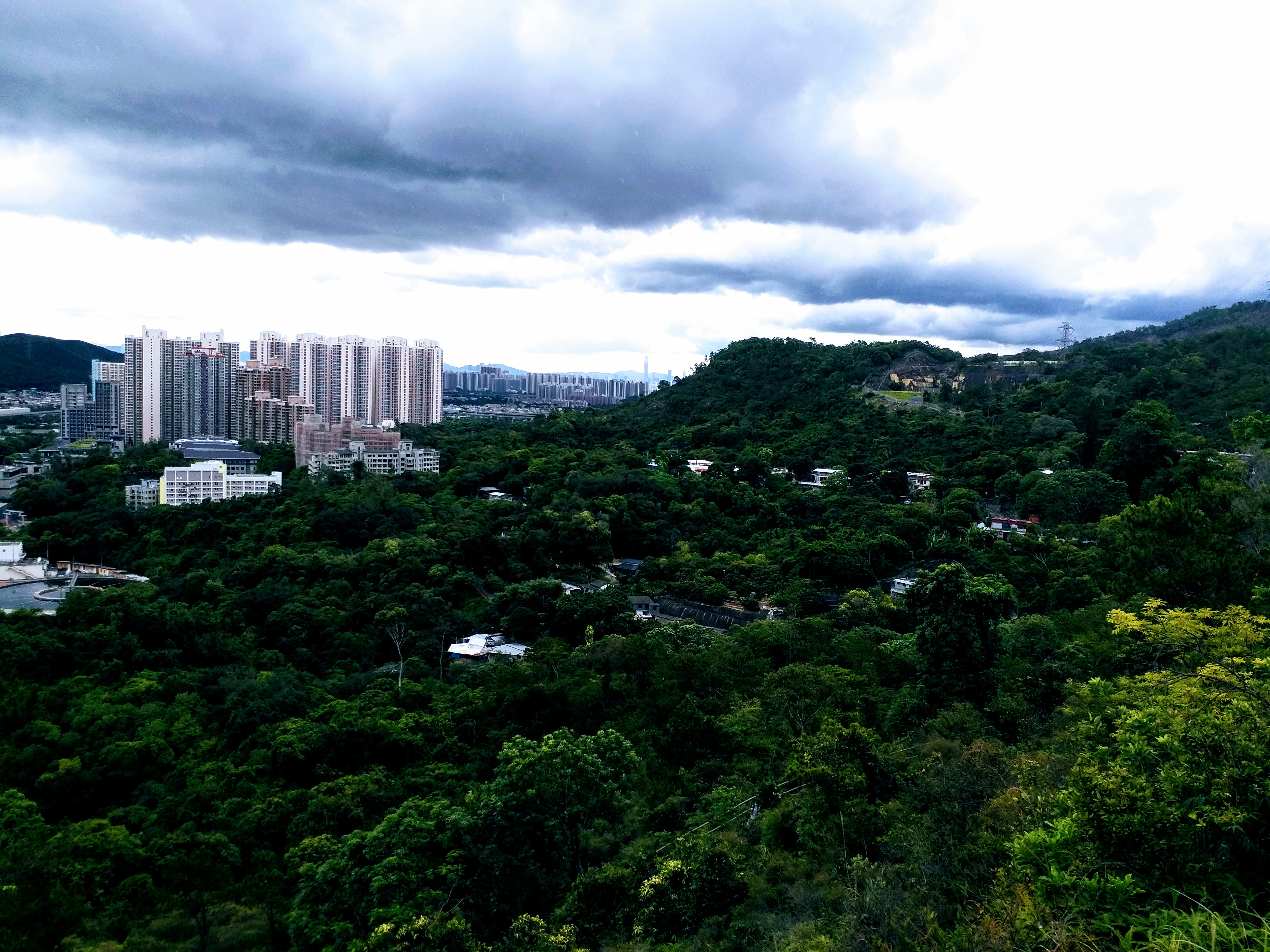 富泰邨南面全貌